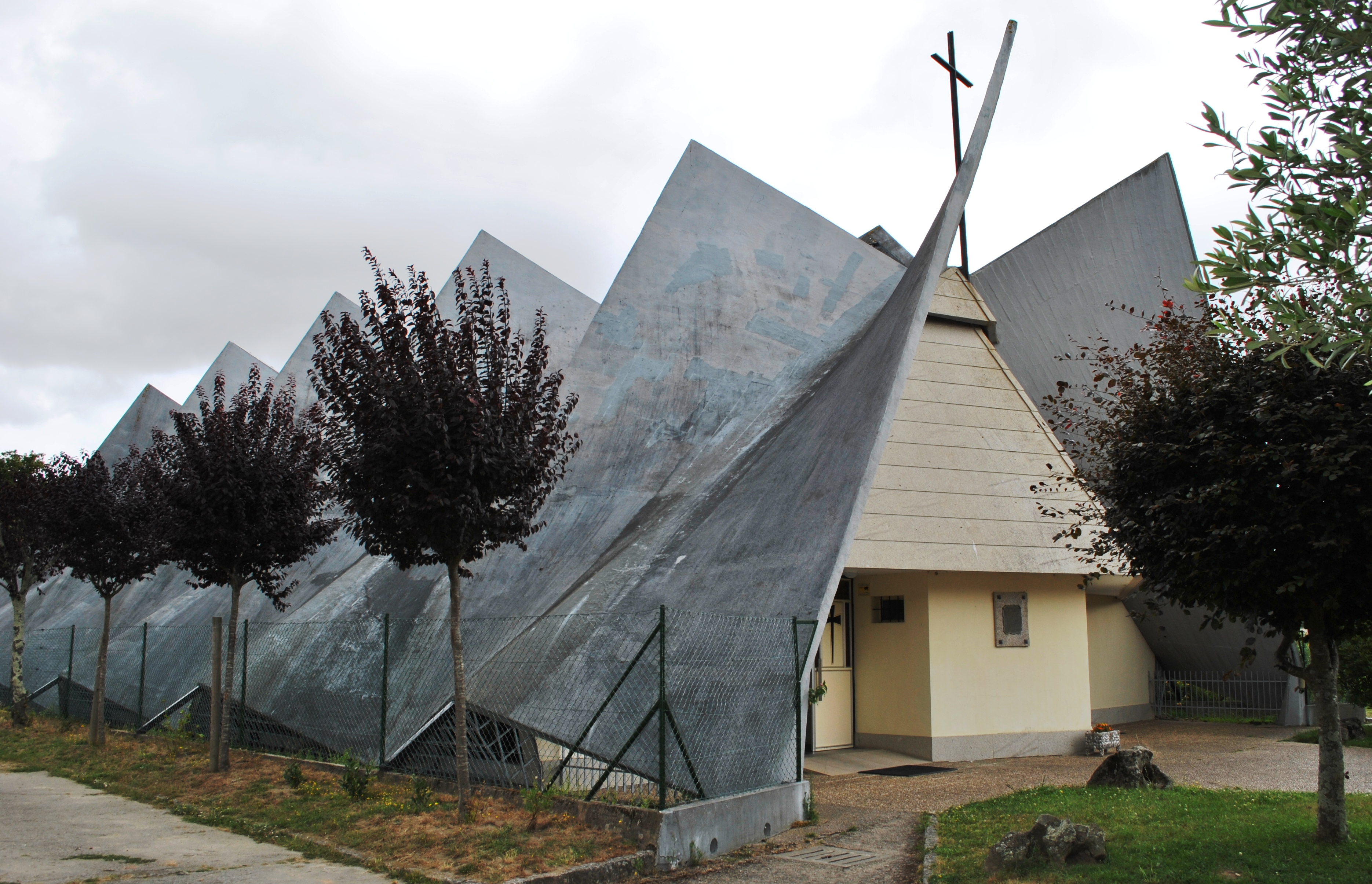 Igrexa de Navia, Vigo.